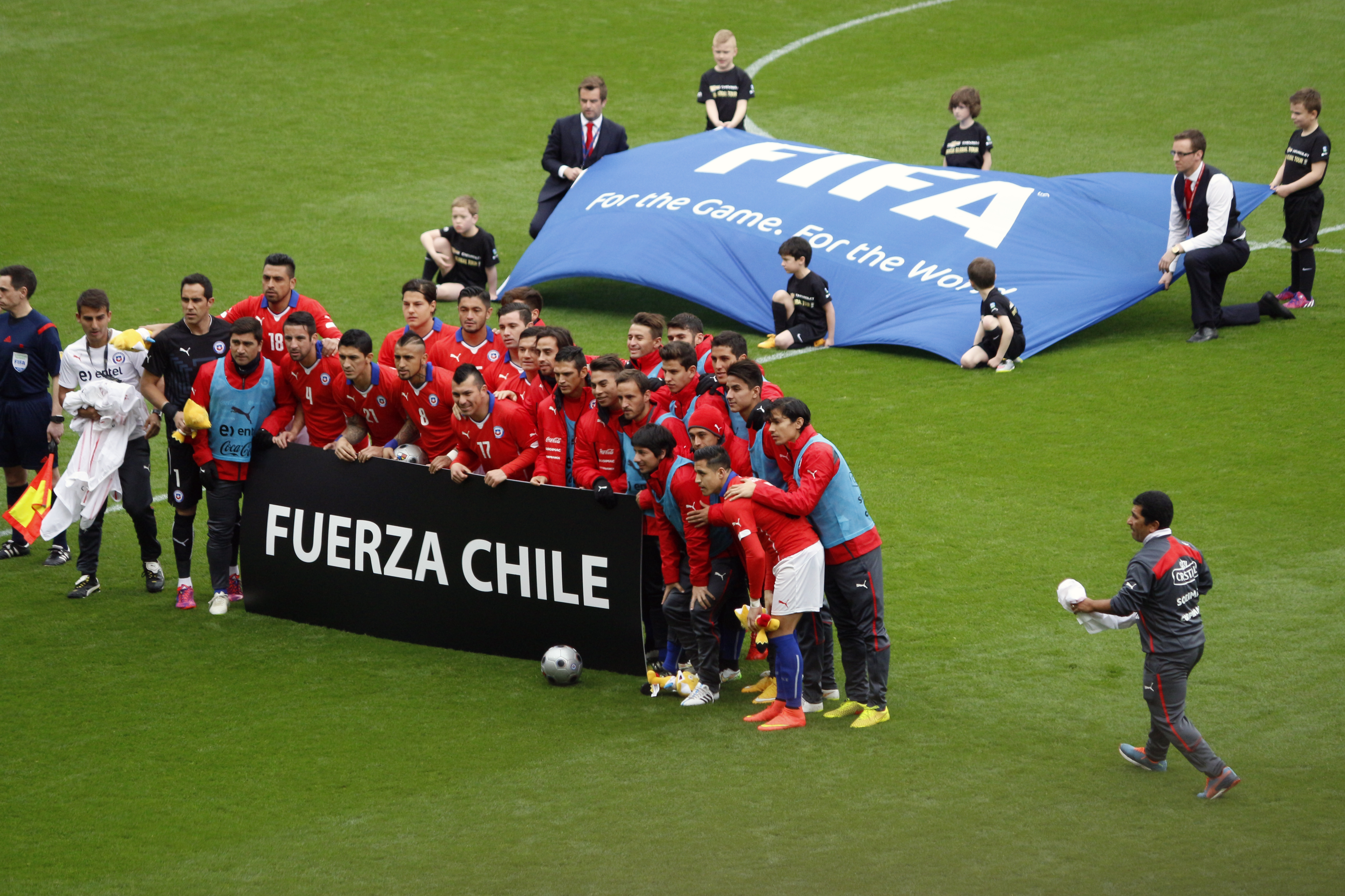 Alexis Sánchez Arturo Vidal Charles Aránguiz Claudio Bravo Eduardo Vargas Enzo Roco Eugenio Mena Fabián Orellana Gary Medel Gonzalo Jara Igor Lichnovsky José Fuenzalida Juan Cornejo Mark González Mauricio Isla Miiko Albornoz Paulo Garcés Pedro Hernández Roberto Gutiérrez Rodrigo Millar Brazil vs Chile, International Friendly, 29th March, 2015, Emirates Stadium, London